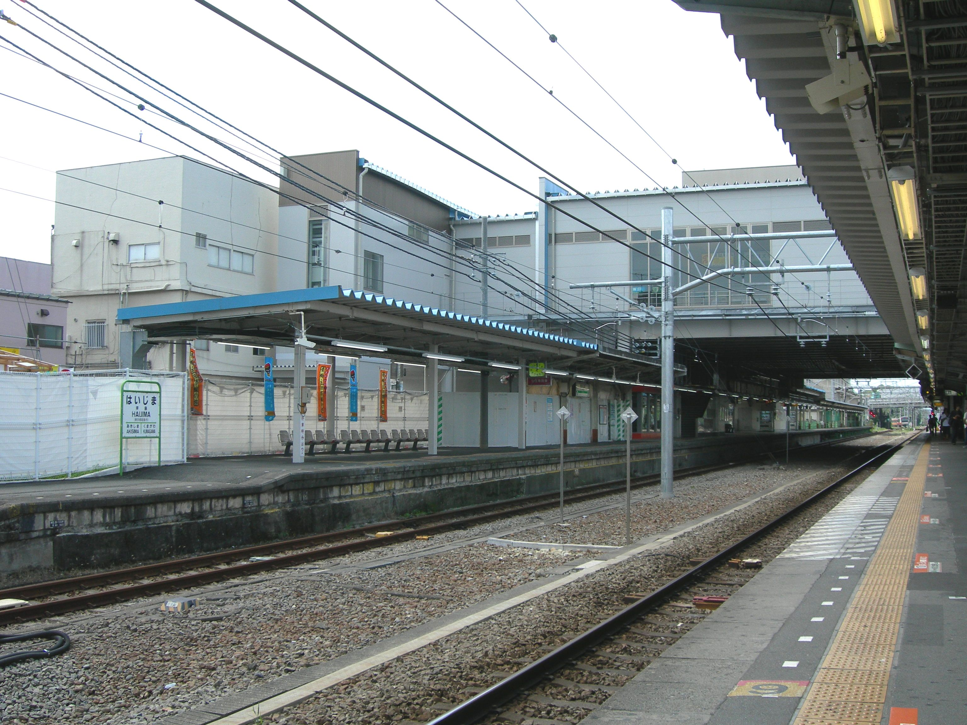 拝島駅2番ホームから１番ホーム(武蔵五日市方面)を撮る